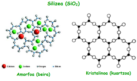 Silize amorfoa (beira) eta kristalinoa (kuartzoa)